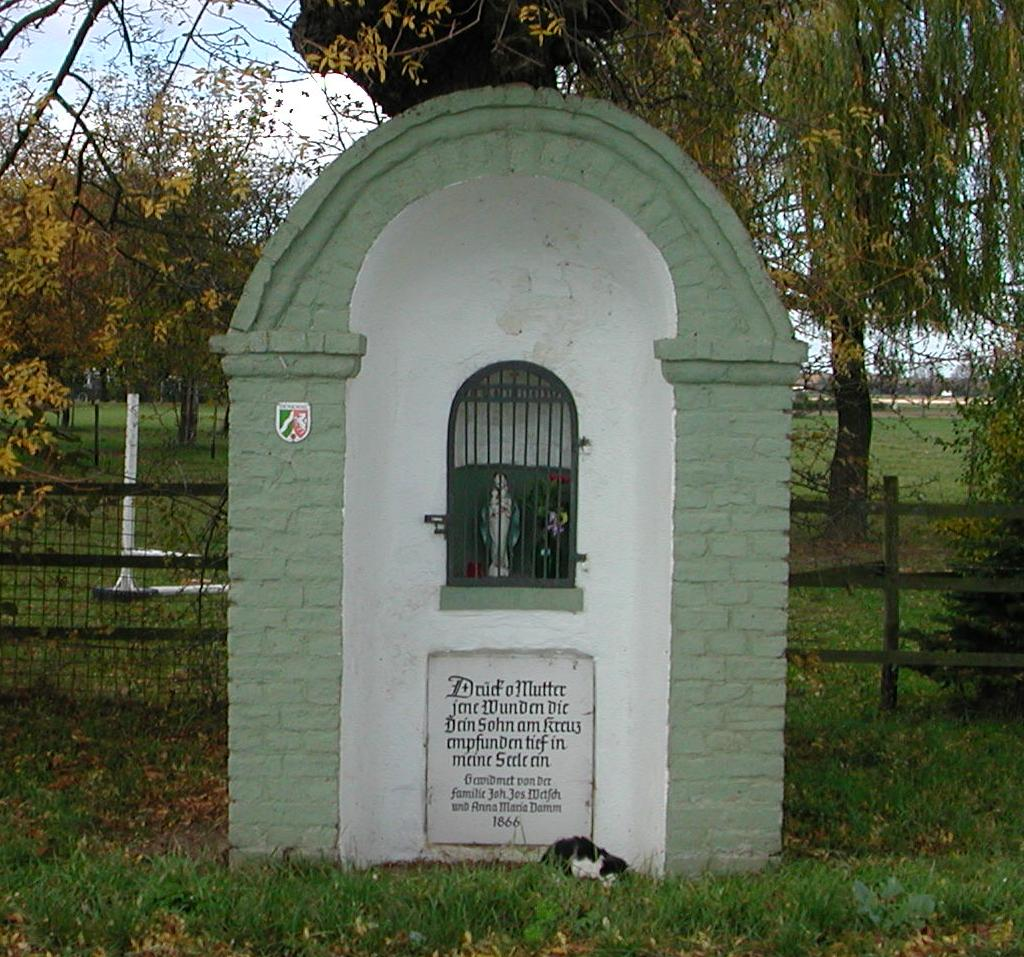 Das Heiligenaus am Ostrand von Dorweiler an der Kreisstraße 53